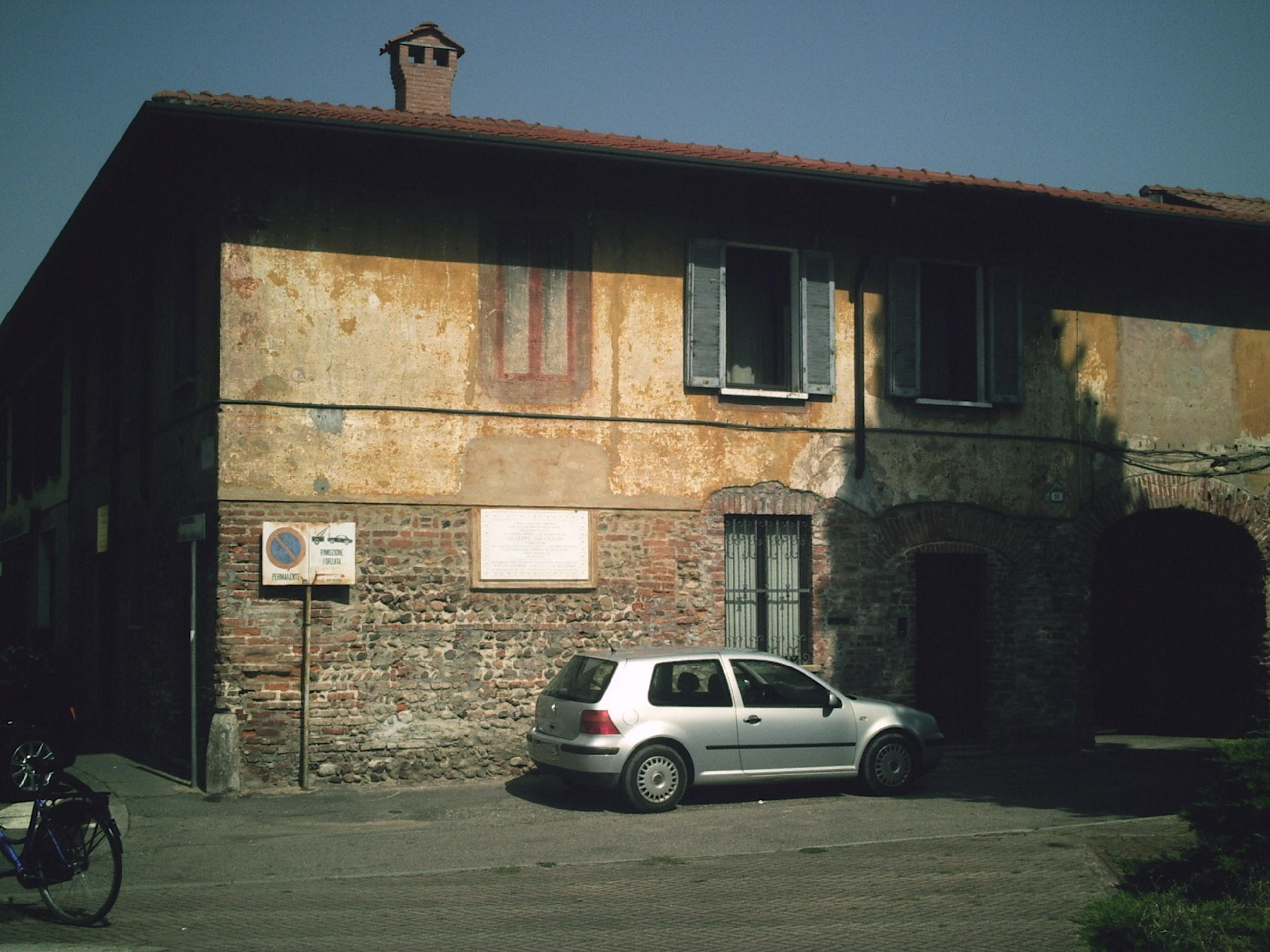 Edificio dove vi si trovava la dimora e la prima bottega dell'ebanista Giuseppe Maggiolini.